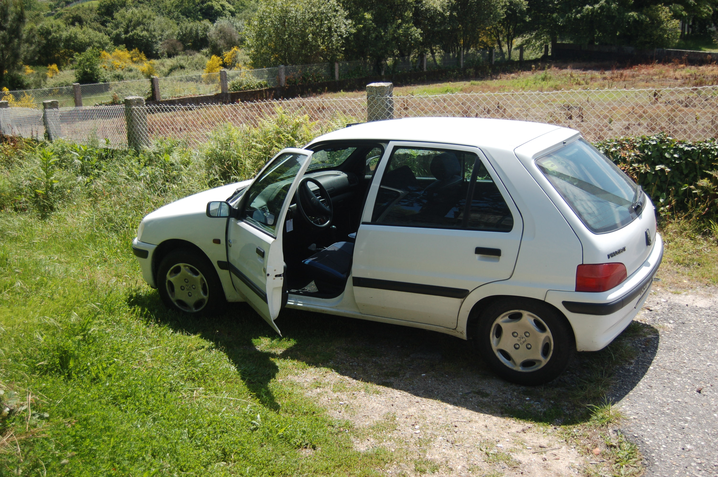 Automóbil Peugeot 106 1.1 de 1999 en Campañó (Pontevedra)